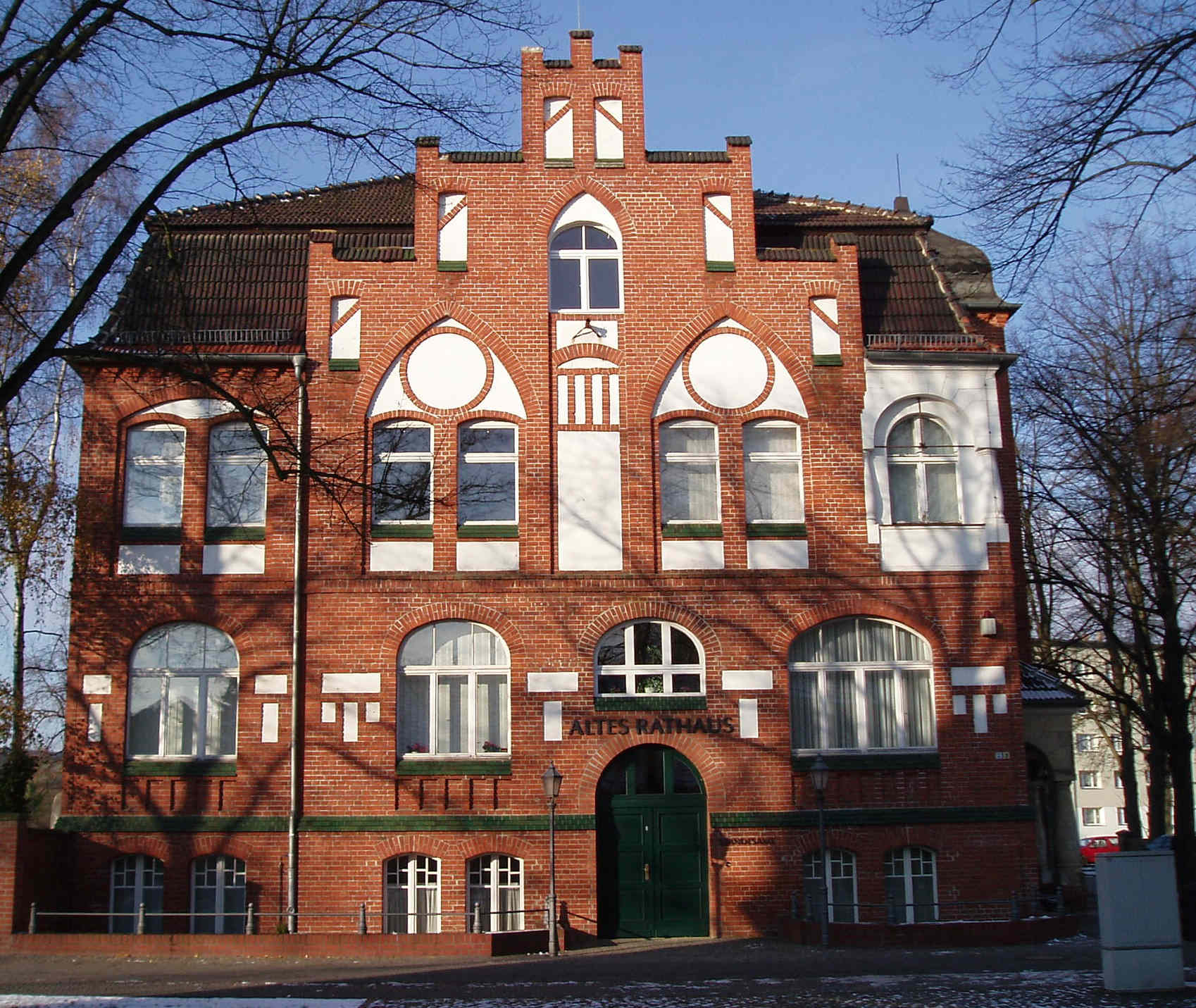 Das Alte Rathaus in Hennigsdorf, Brandenburg, Deutschland.